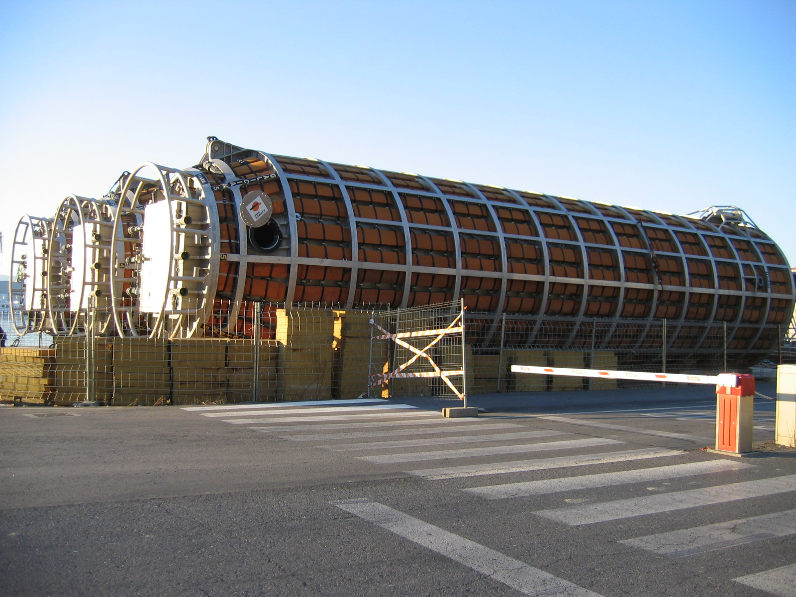 Lanzadeiras de Repsol para extrae-lo fuel do Prestige (porto de Vilagarcía)